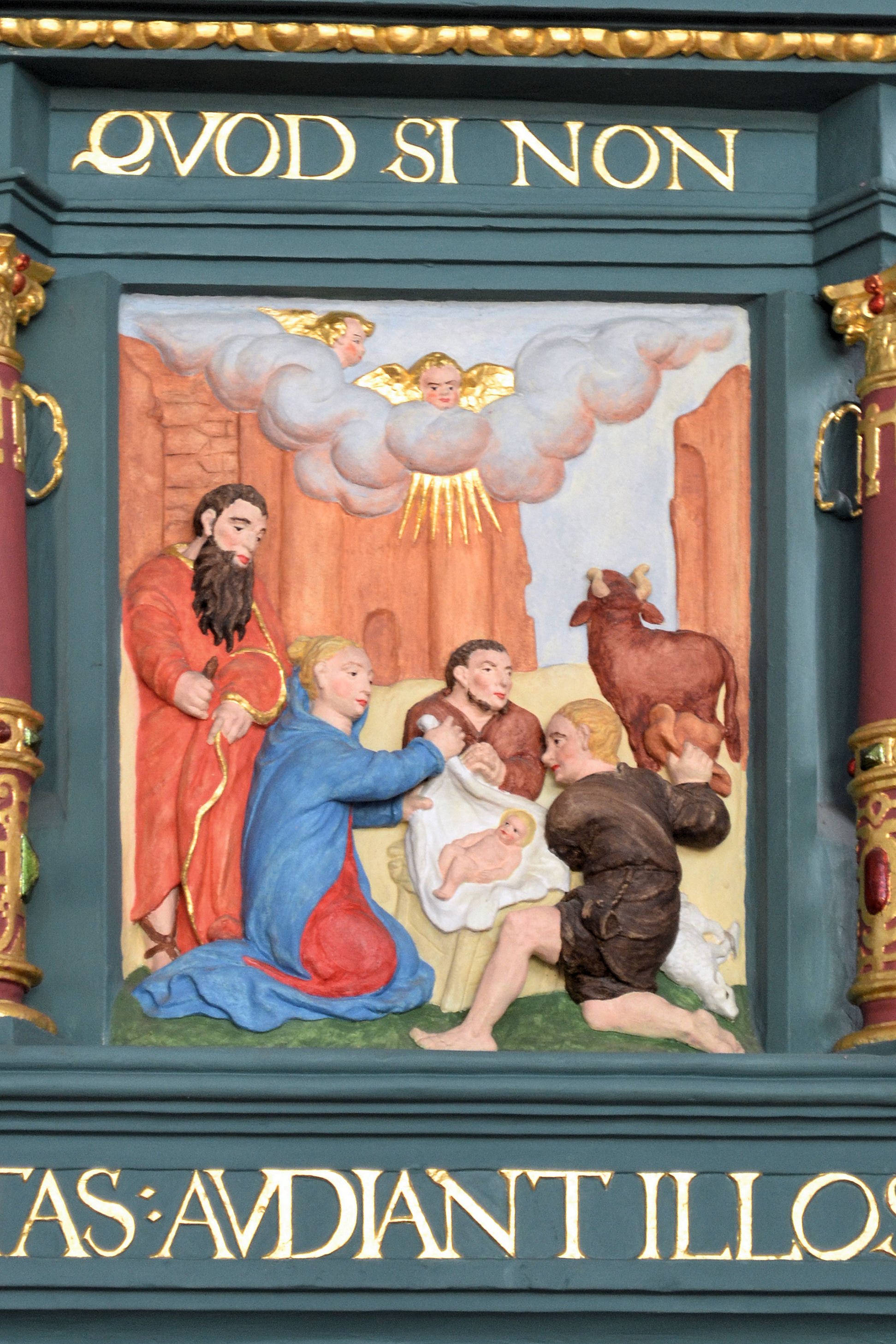 Kościół Narodzenia Najświętszej Maryi Panny w Gryfinie